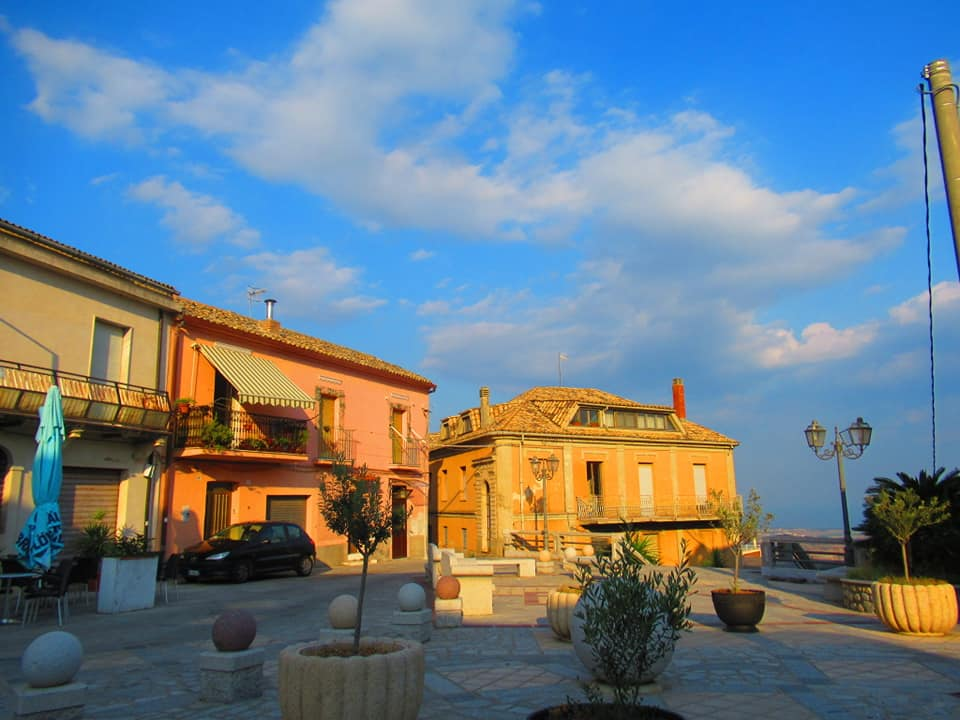 Piazza Casolini